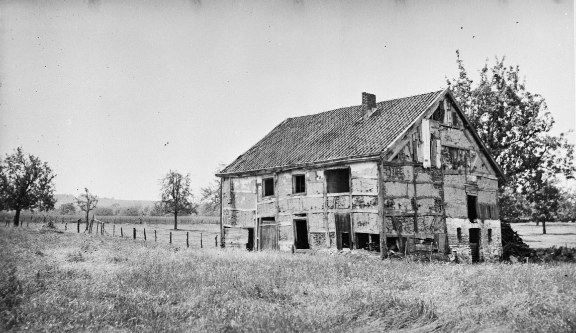 Vakwerkhuis: Vervallen vakwerkhuis in open terrein: Aggene Banket aan de Oude Akerweg 20 te Holset, foto uit ca. 1960 voor voor de restauratie.)